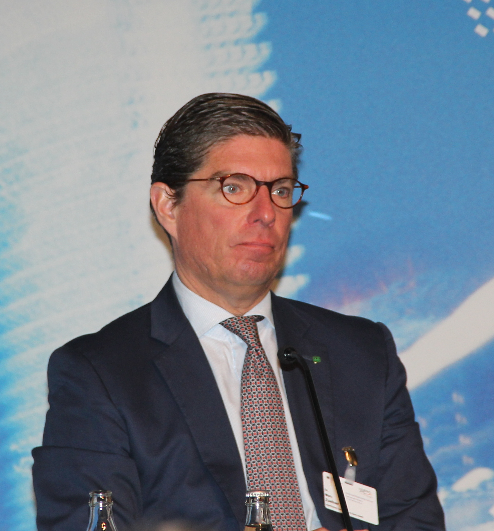 Marc Zoellner - Owner and CEO of Accumulatorenwerke HOPPECKE Carl Zoellner & Sohn